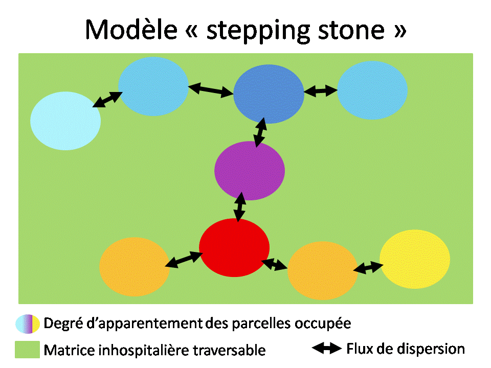 Modèle de dispersion biologique